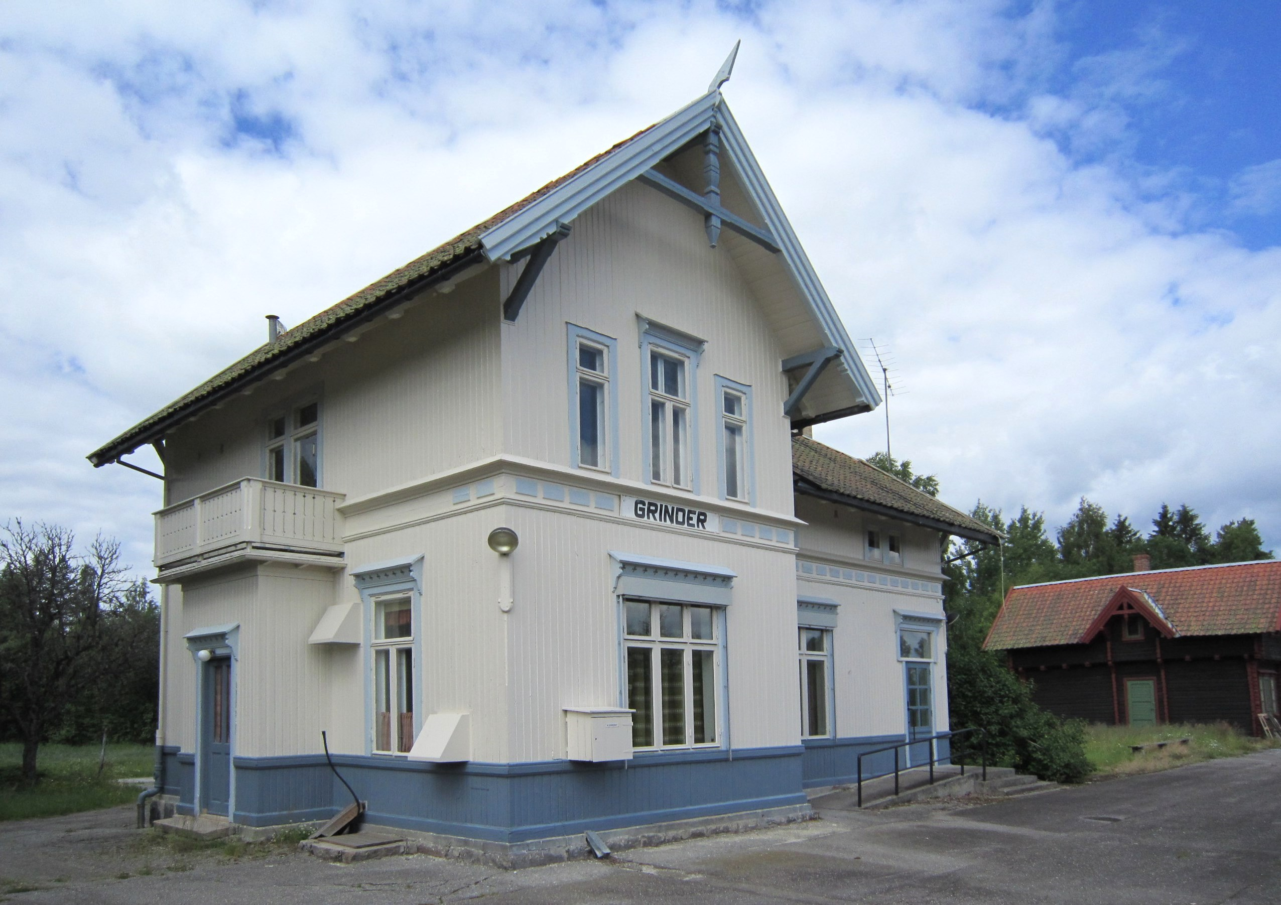 Grinder stasjon på Solørbanen